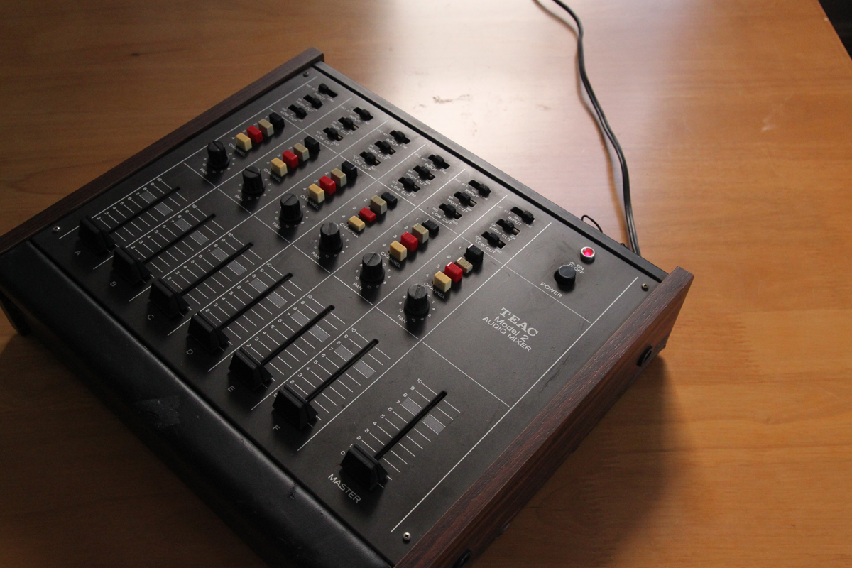 TEAC Model 2 Audio Mixer (1975) left angled